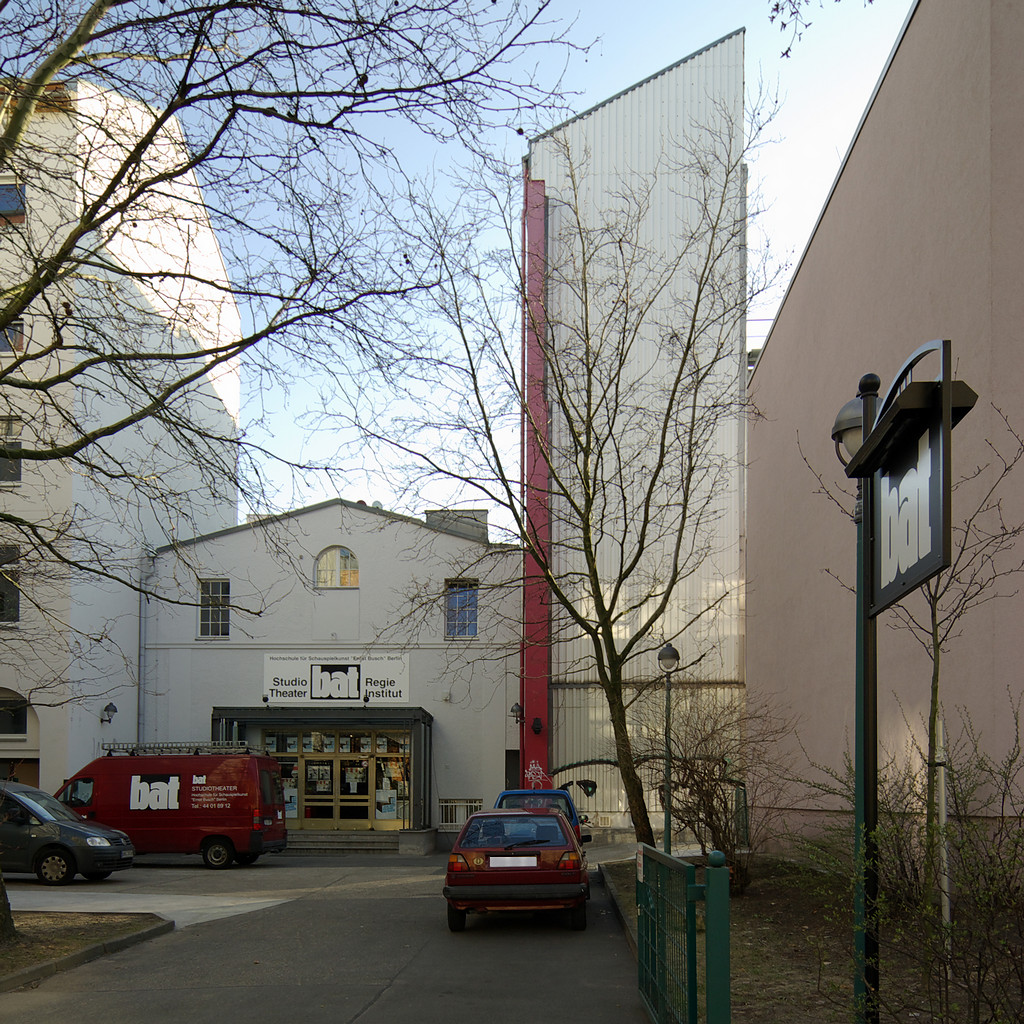 Das bat-Studiotheater und Regieinstitut der Hochschule für Schauspielkunst „Ernst Busch“ Berlin in der Belforter Straße, Prenzlauer Berg.